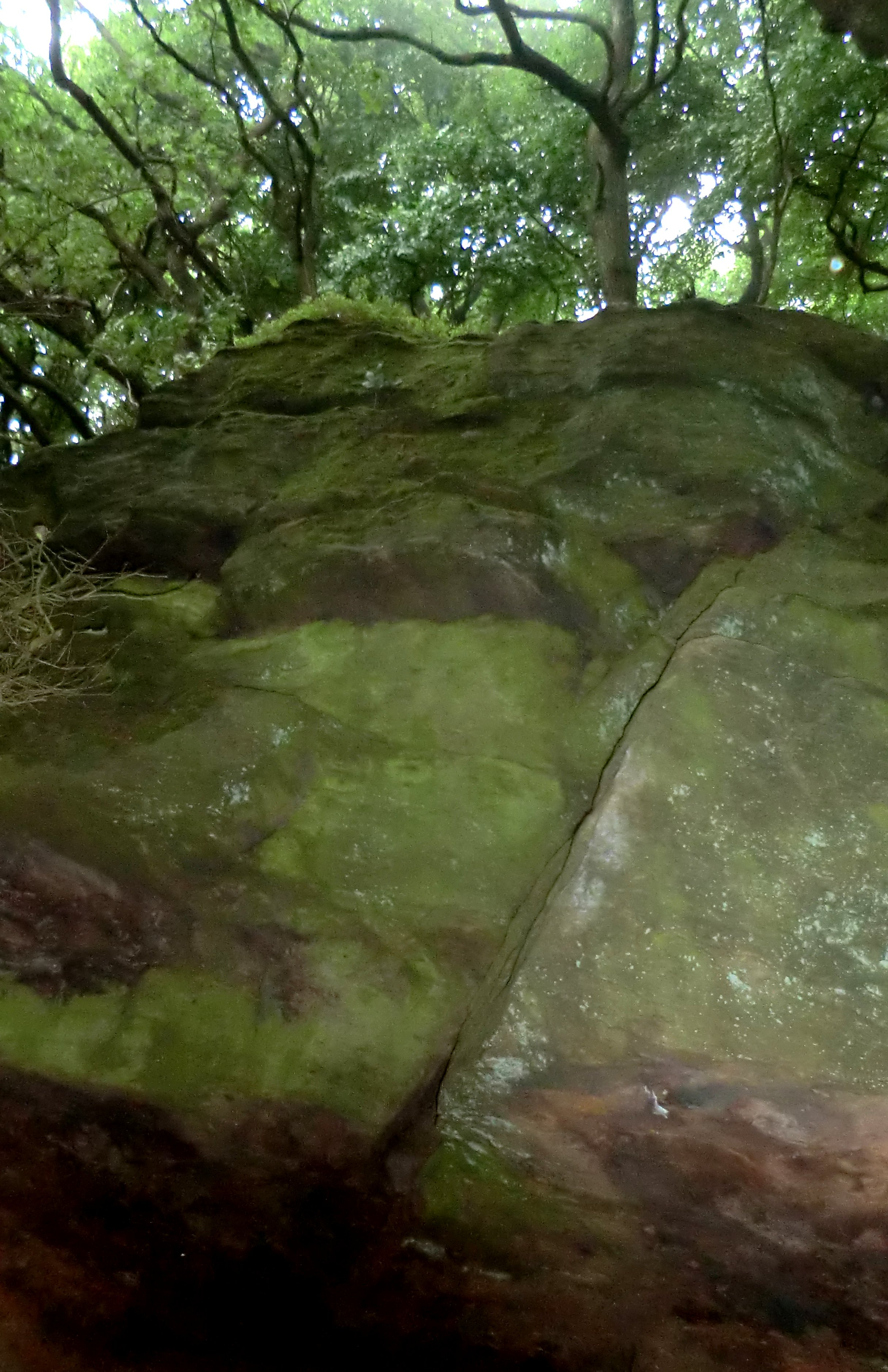 Habichtswand am Häverstädter Berg von unten; Bereich im Naturschutzgebiet „Wittekindsberg“